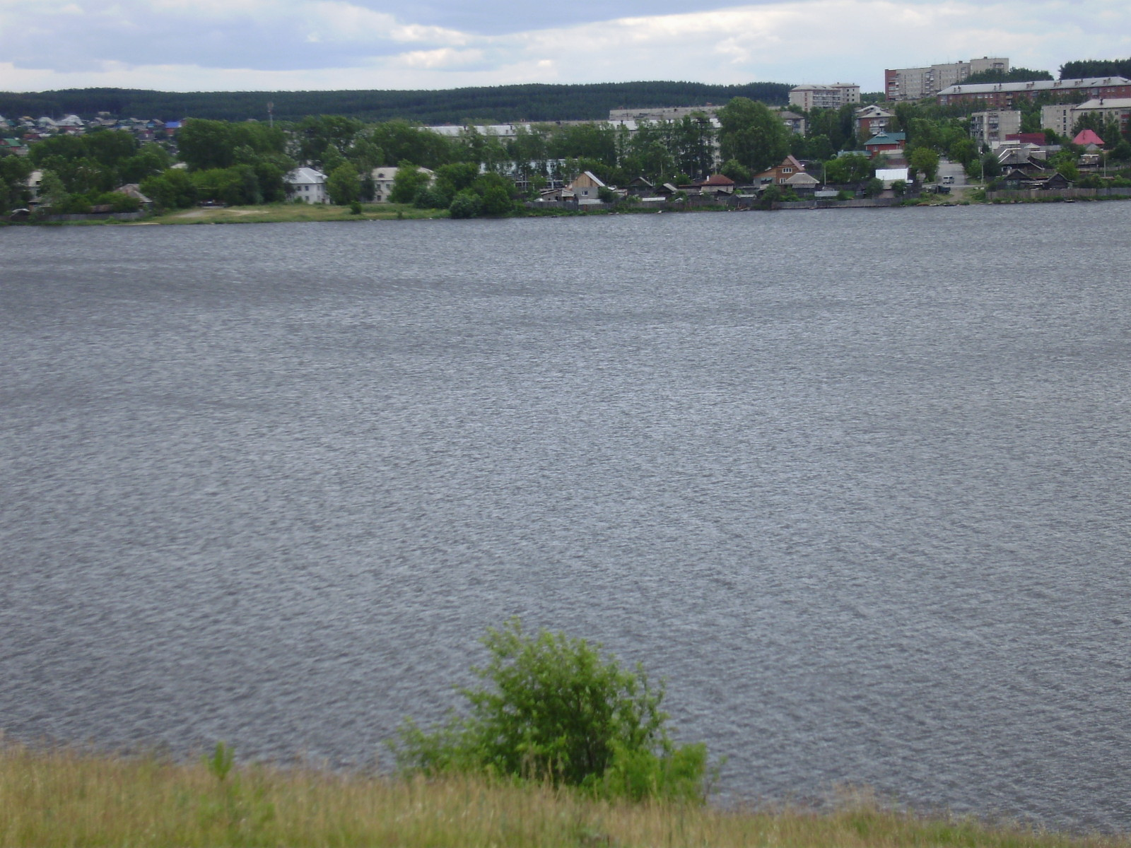 г.Реж, Свердловская область